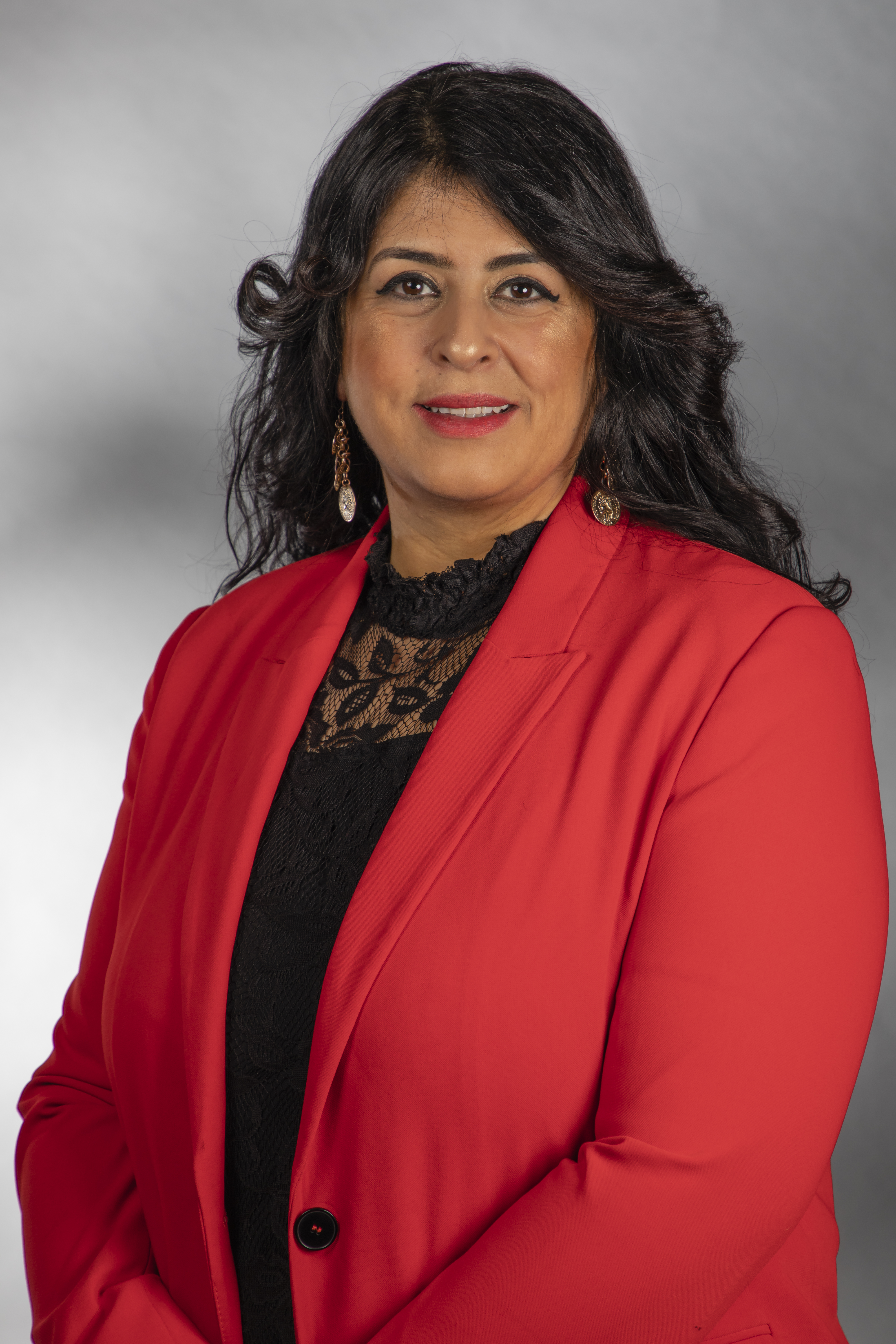 Sülmez Dogan